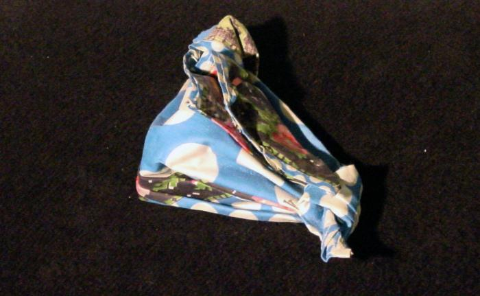 Model. Klein model van een angisa, bedrukt met rozen en met de naam "kawna hede"; het eerste deel van deze naam verwijst naar een muzieksoort of -instrument, het tweede betekent hoofd. Angisa's vormen onderdeel van de dracht van een kotomisi. De koto is een in Suriname ontstane klederdracht die werd bedacht door slavenhouders en hun vrouwen om hun slavinnen 'zedig' te kleden. De dracht bestaat uit een koto (rok), jaki (jak) en angisa (hoofddoek). Aan de dracht kon men aflezen tot welke godsdienst de slavenhouder behoorde. Hoewel vroeger dagelijkse kleding, veranderde de koto later in gelegenheidskleding. De koto en vooral de angisa spraken en spreken een geheime taal (Henar-Hewitt, 1987:35). . Model van een Surinaams-Creoolse hoofddoek Unknown language: Angisa